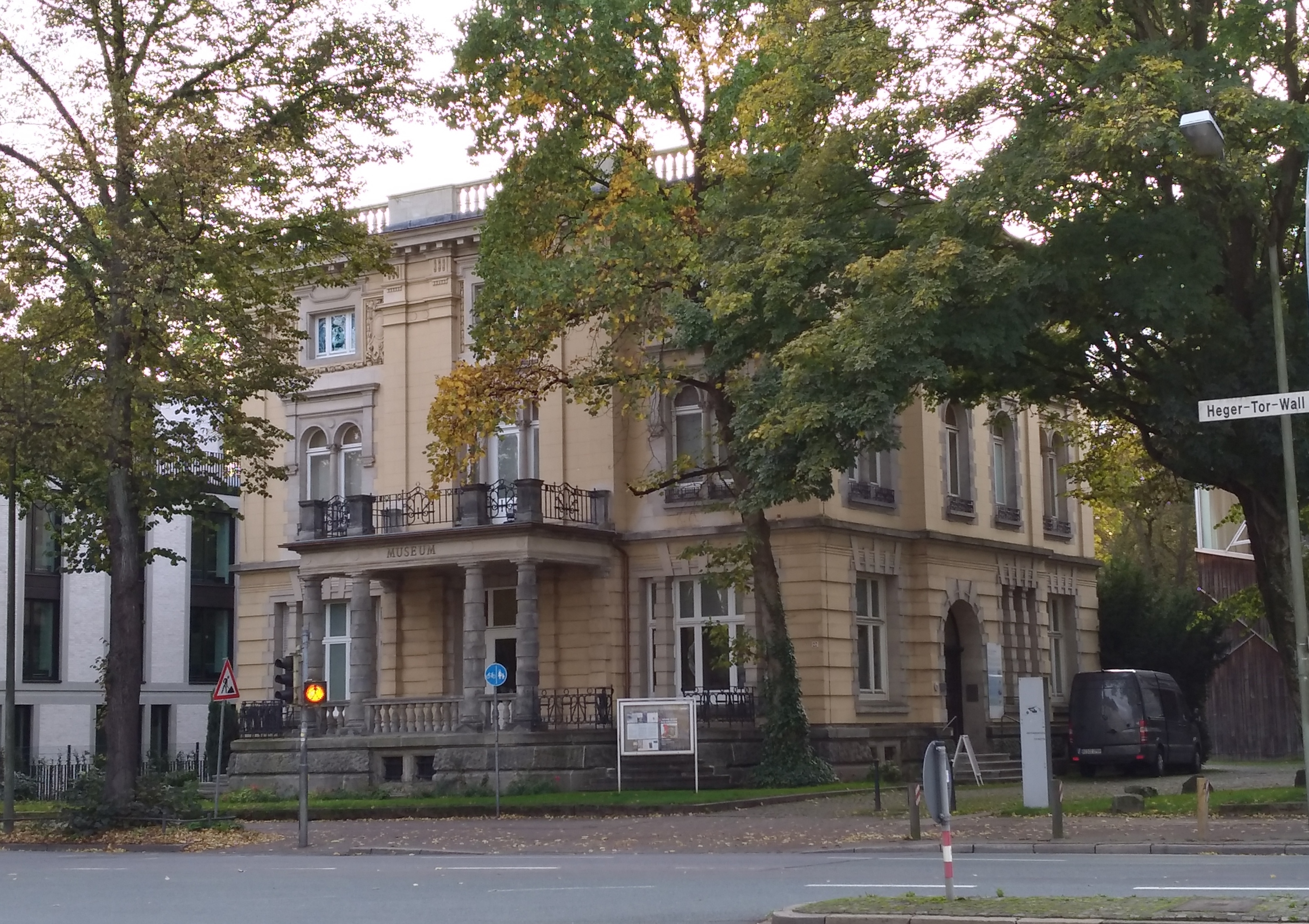 Die Villa Schlikker am Heger-Tor-Wall in Osnabrück ist heute Teil des Kulturgeschichtlichen Museums.